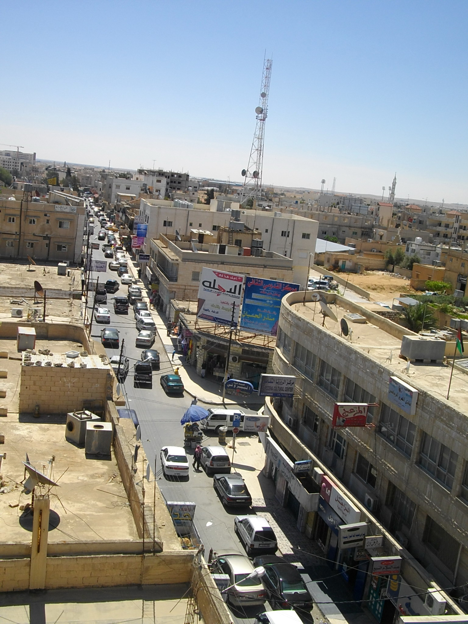 Al-Mafraq, Jordan